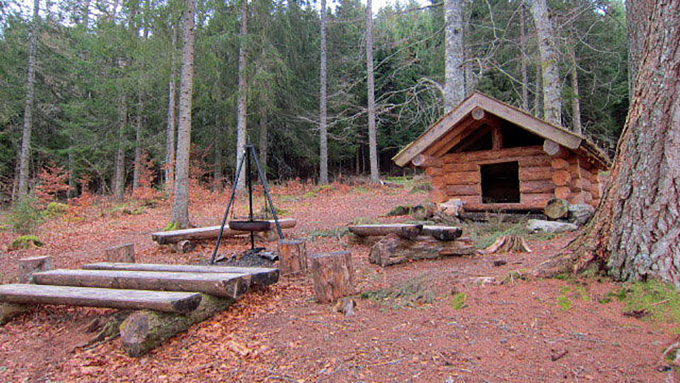 Viser verdens nordligste bøkeskog i Stangvik i Surnadal kommune på Nordmøre. Gapahuken er satt opp av Stangviks tidligere ordfører Jonny Aronson Melkild, nåværende eier og leder av Bondehuset. Gapahuken har fått navn OllonAron med hentydning til bøkeskogens opprinnelse.